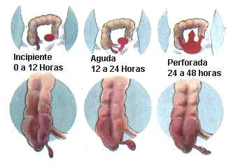 Apendicitis 006